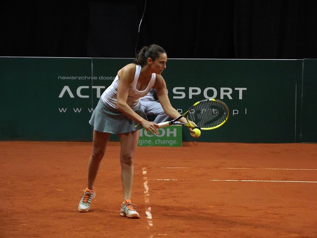 Zdjęcie zrobione podczas kobiecego turnieju tenisowego BNP Paribas Katowice Open, w katowickim Spodku.